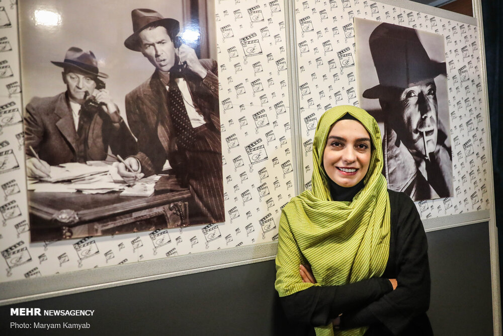 گفتگو با الیکا عبدالرزاقی در خبرگزاری مهر